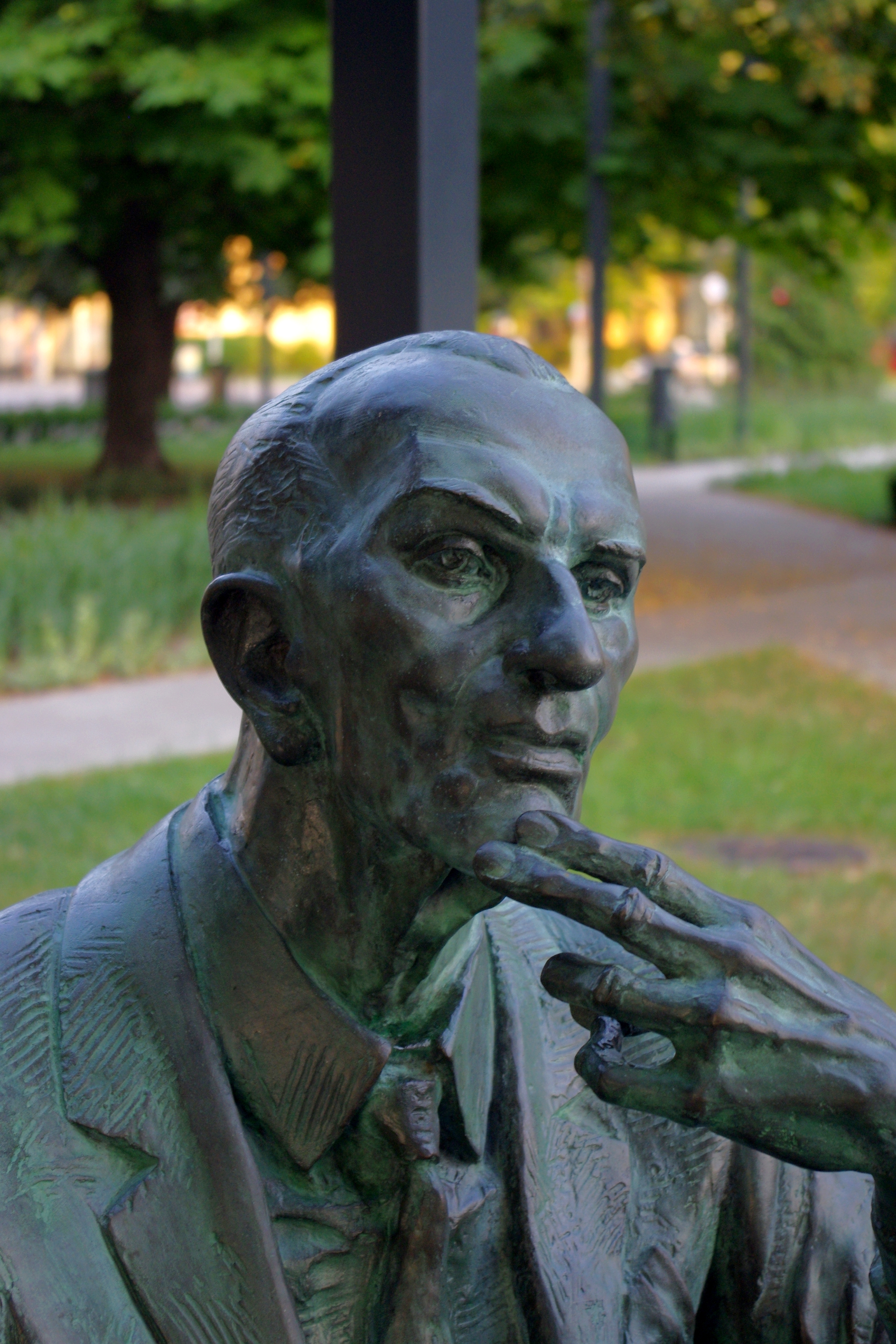 Ławeczka Jana Karskiego w Warszawie przy Muzeum Historii Żydów Polskich